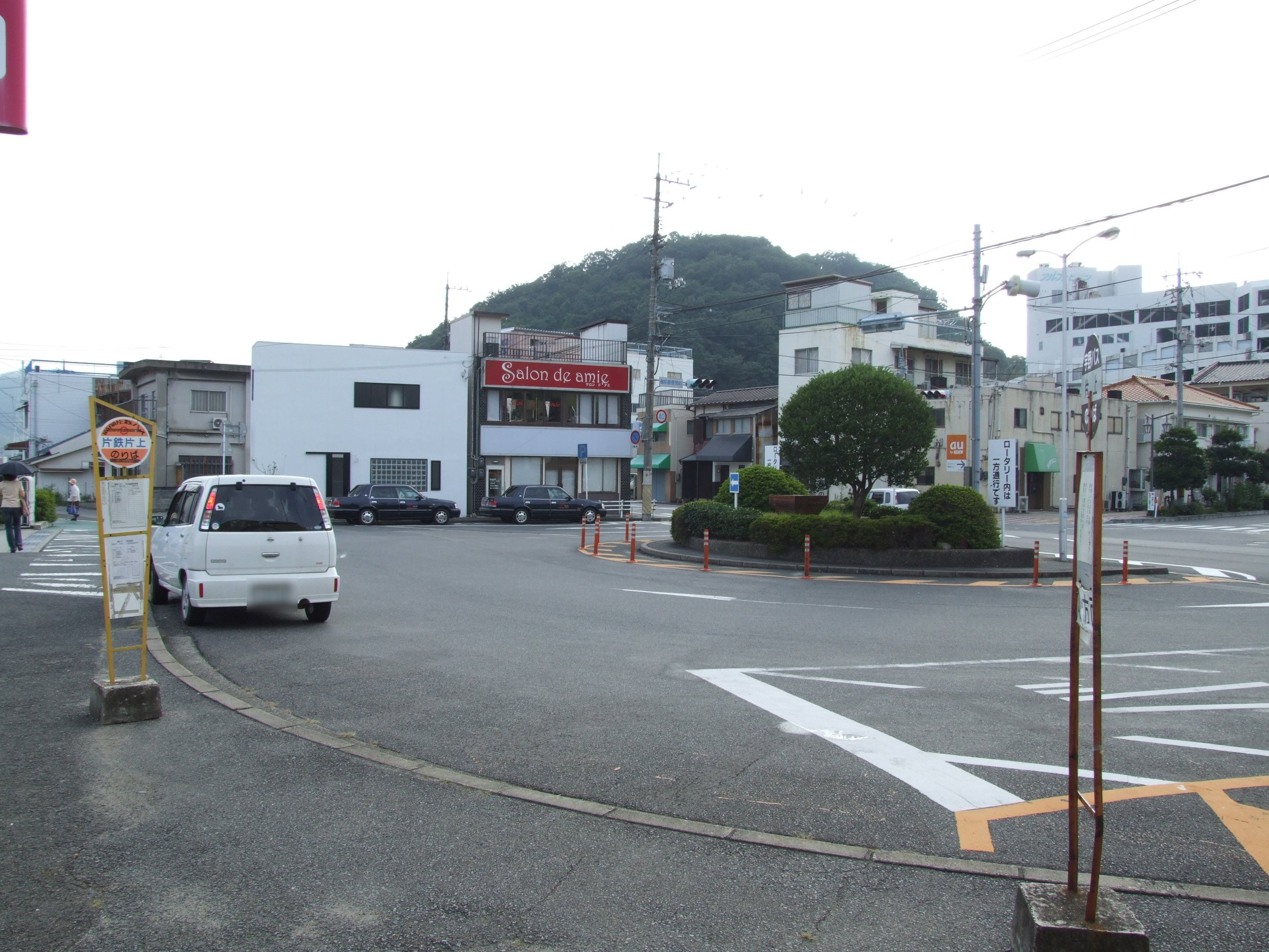 2009年8月現在の旧片上鉄道片上駅前ロータリーの様子。